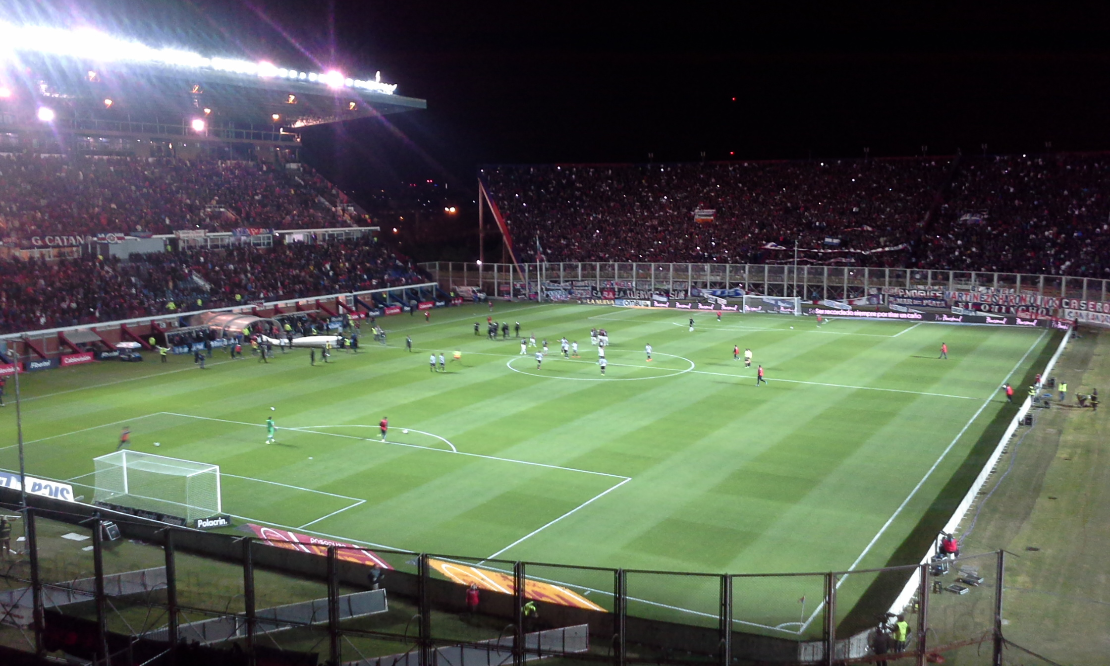 San Lorenzo enfrentando a Racing por el campeonato de primera división 2015.